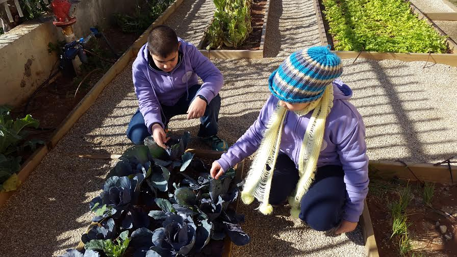 תלמידים חוקרים מחזור החיים של תולעים בשדה בית הספר